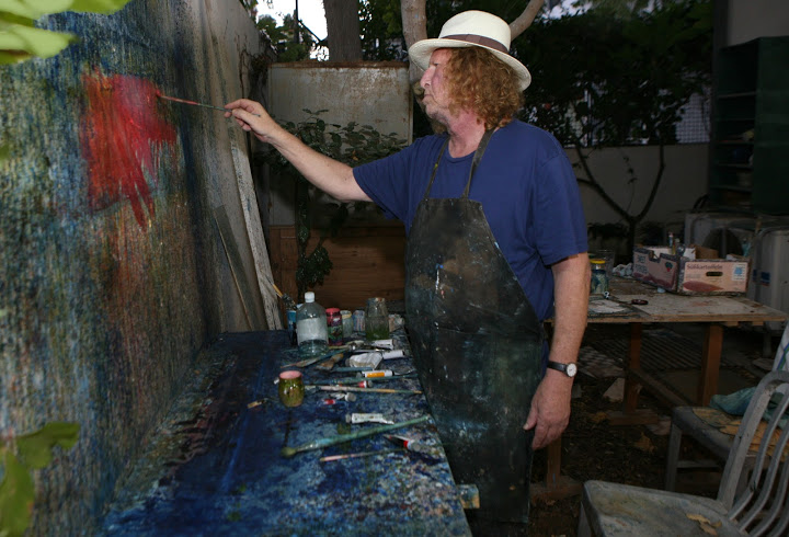 פינת עבודתו של הצייר בחצר הבית בתל אביב